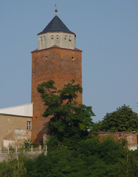 Eilenburg, eigenes Foto, public domain Mewes 05:53, 19. Feb 2005 (CET) Ileburgturm